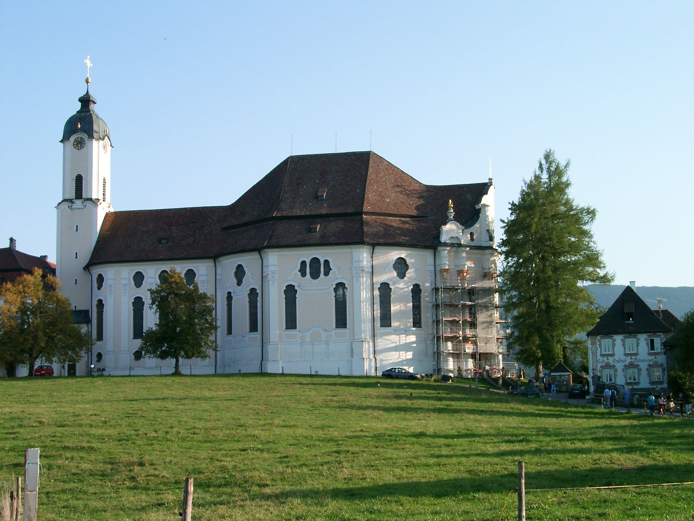 Wieskirche, Germany.